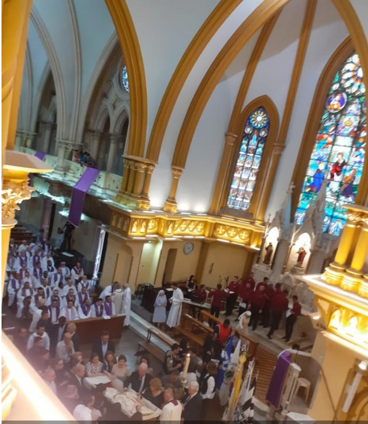 Exéquias